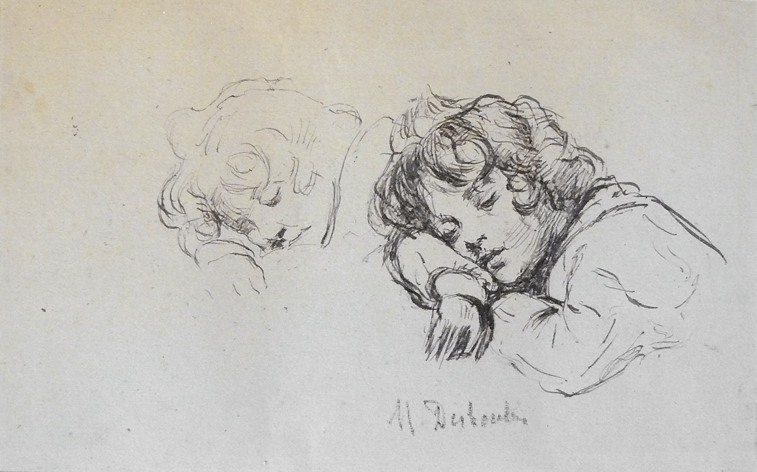 Desboutin M. - Ink - Etudes d'enfant dormant - 26,3x16,6cm; il s'agit de façon presque certaine d'un des enfants de l'artiste.